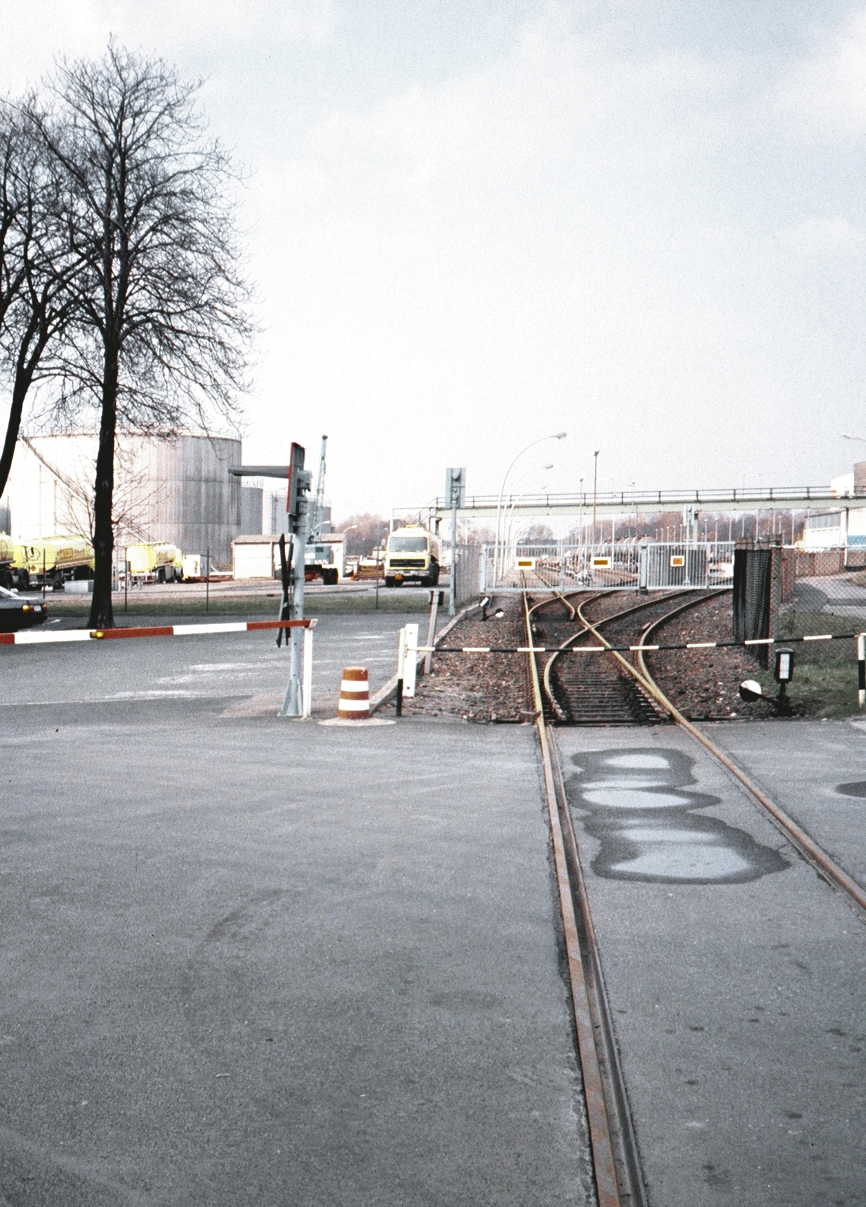 Tanklager Salzhof Berlin